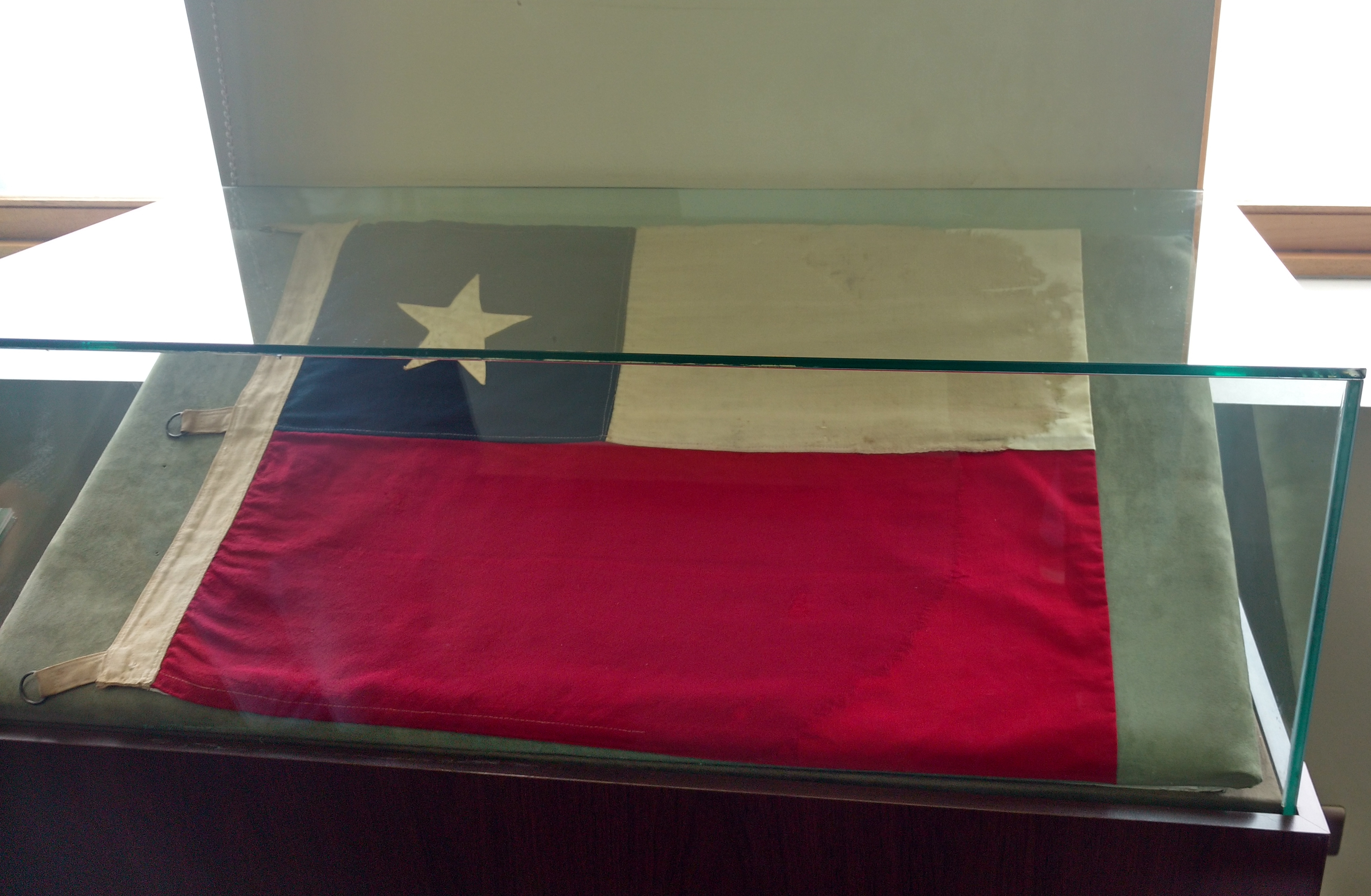 Esta bandera flameó en la laguna del Desierto cuando ocurrió el incidente de 1965 en este lugar. Hoy se encuentra en el Museo Histórico Carabineros de Chile.